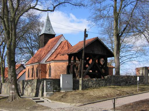 Kościół pw. Matki Boskiej Bolesnej w Osowie elewacja południowa, widok z płd.-wsch.